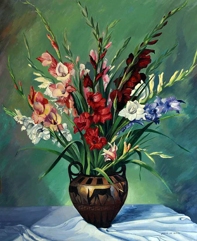 mélange poterie et peinture